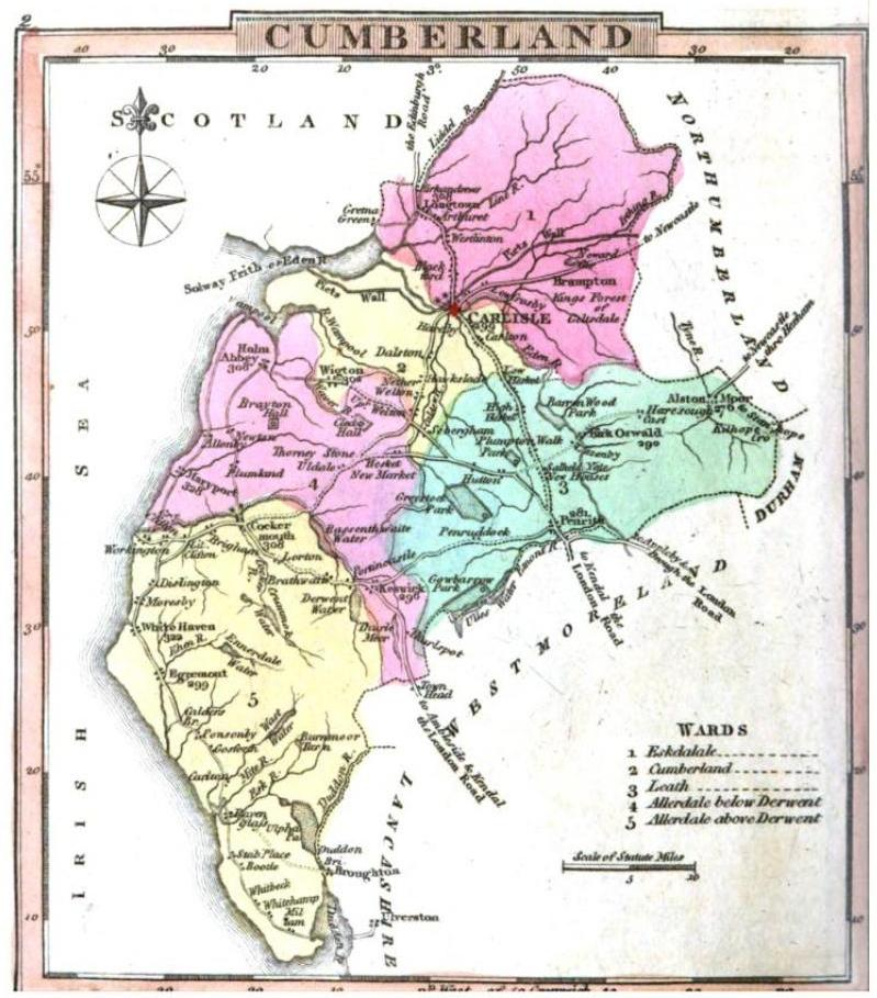 Cumberland